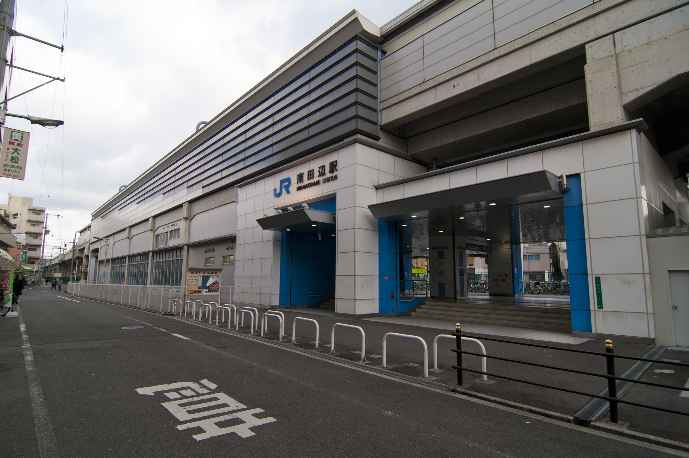 西日本旅客鉄道阪和線南田辺駅